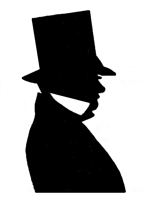 Иустин Евдокимович Дядьковский (1784—1841) — русский врач-терапевт, ординарный профессор Московского университета.